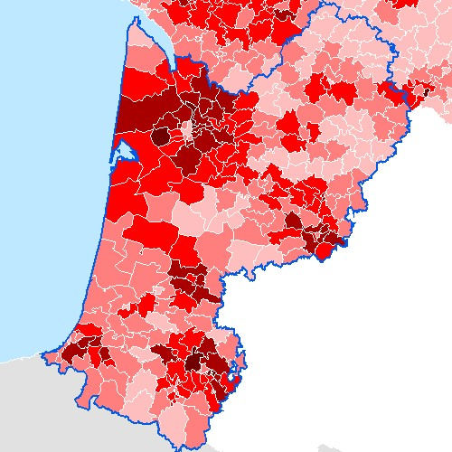 Carte de la proportion des moins de 20 ans dans la population de la région Aquitaine, par cantons, en 1999. Légende : Image:-20ans1999-canton legende.jpg Cette carte est généreusement fournie par l'IAAT (Institut atlantique d'aménagement du territoire) Je la place comme convenu avec eux sous licence GFDL Utilisateur:Archeos Catégorie:Carte dÃ©mographique Catégorie: Aquitaine Catégorie:Image GFDL - Société